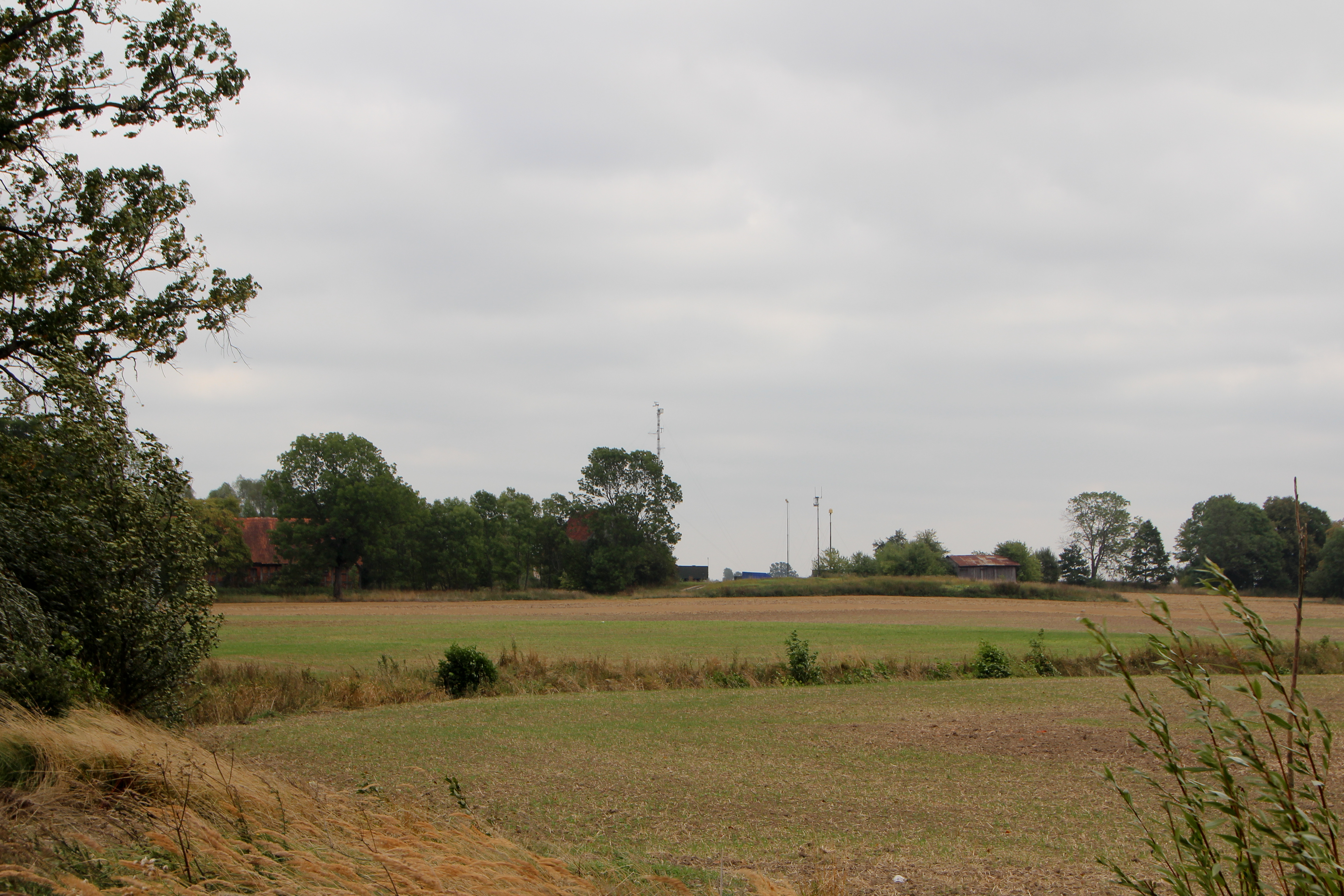 Nowy Dwór Momajński - wieś w Polsce położona w województwie warmińsko-mazurskim, w powiecie kętrzyńskim, w gminie Barciany.